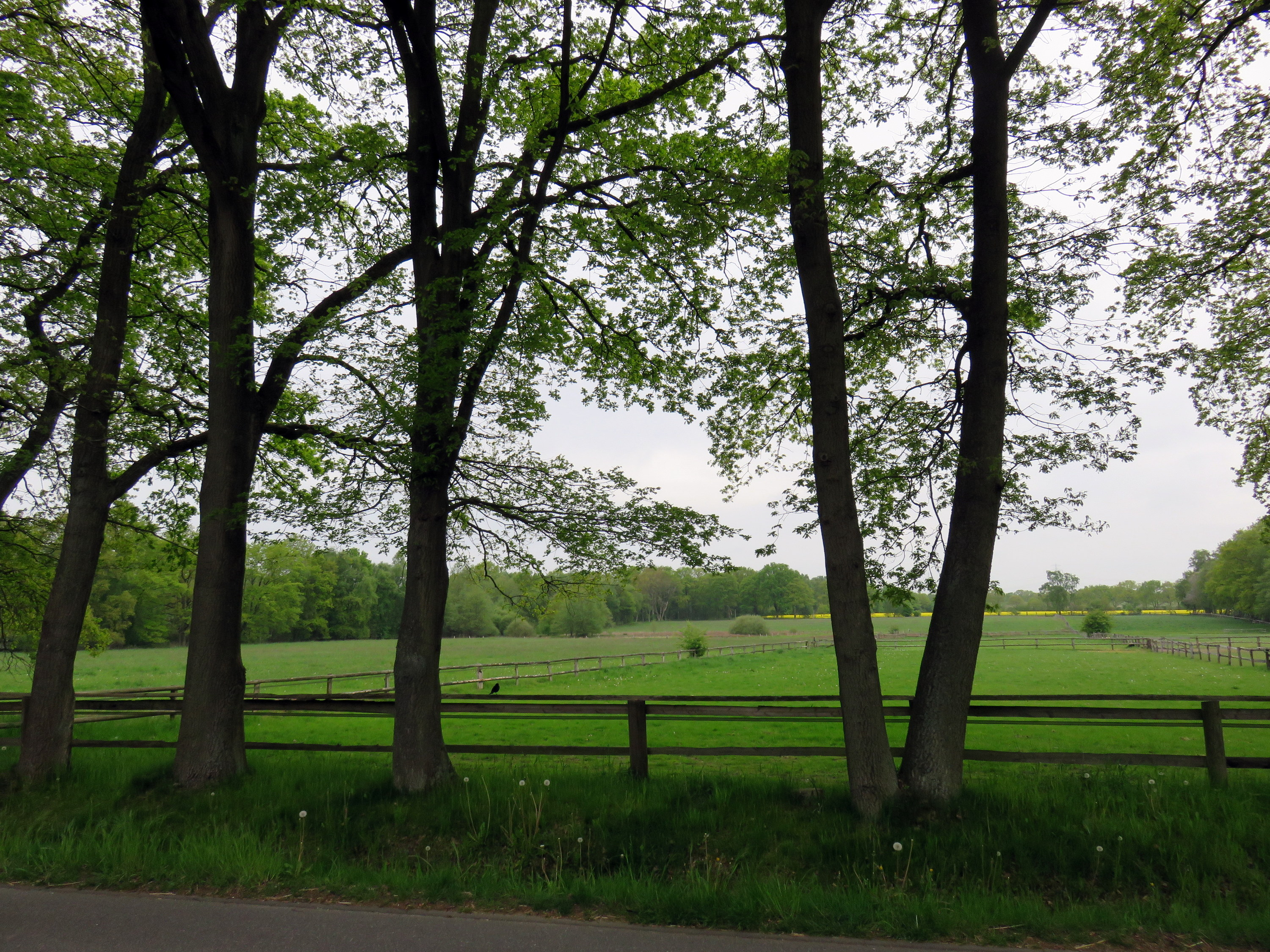 Blick auf Teil des Naturdenkmals Poppenbüttler Graben (im hinteren Teil der Weideflächen) vom Kupferteichweg in Hamburg-Poppenbüttel aus; umgebende Bereich im LSG „Hummelsbütteler Feldmark/Alstertal“.